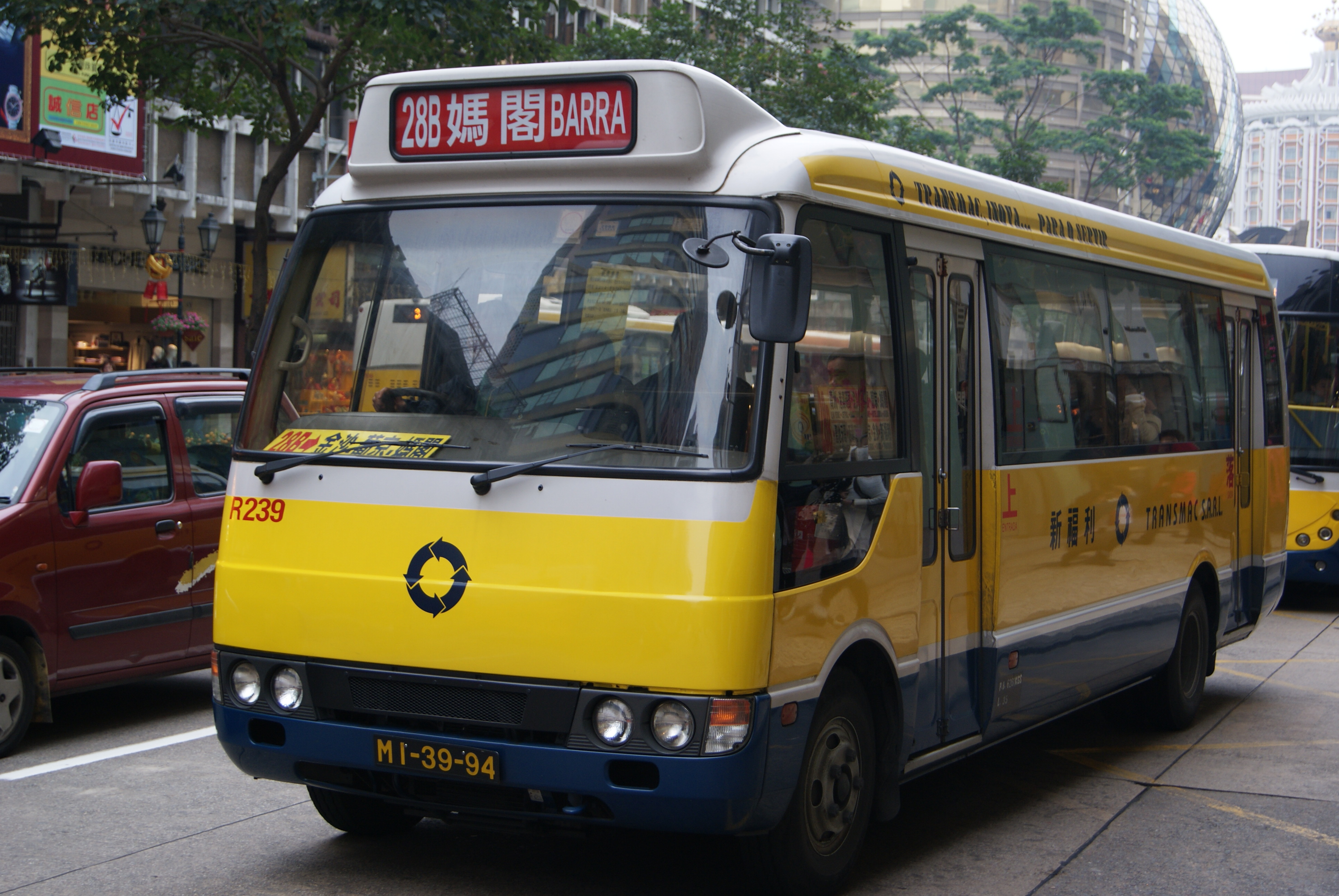 新福利三菱Roas小巴R239行駛28B路線